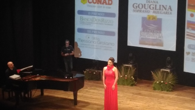 La vincitrice del concorso: Diana Gouglina, soprano bulgaro